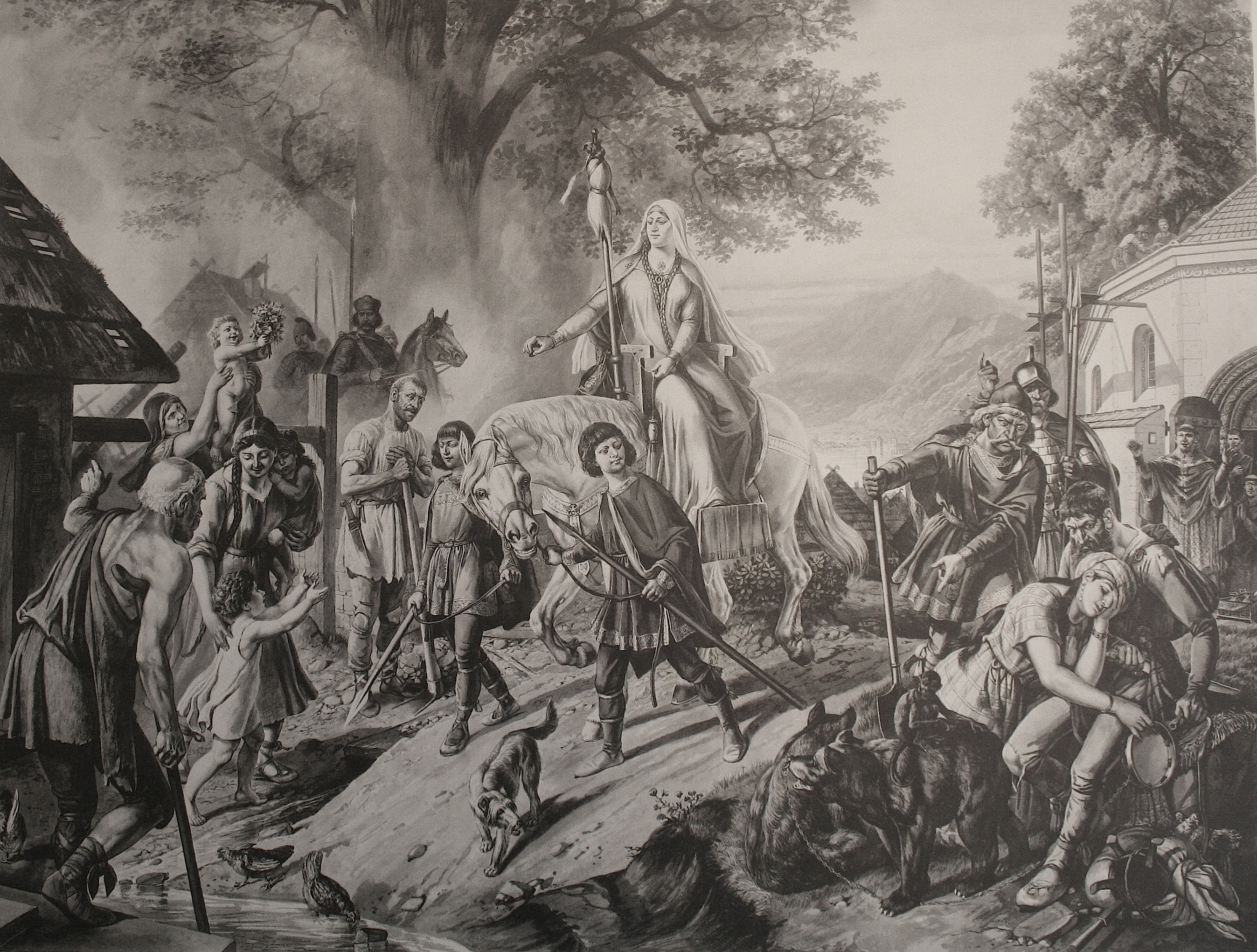 Bertha von Burgund auf einer Darstellung des Historienmalers Karl Jauslin